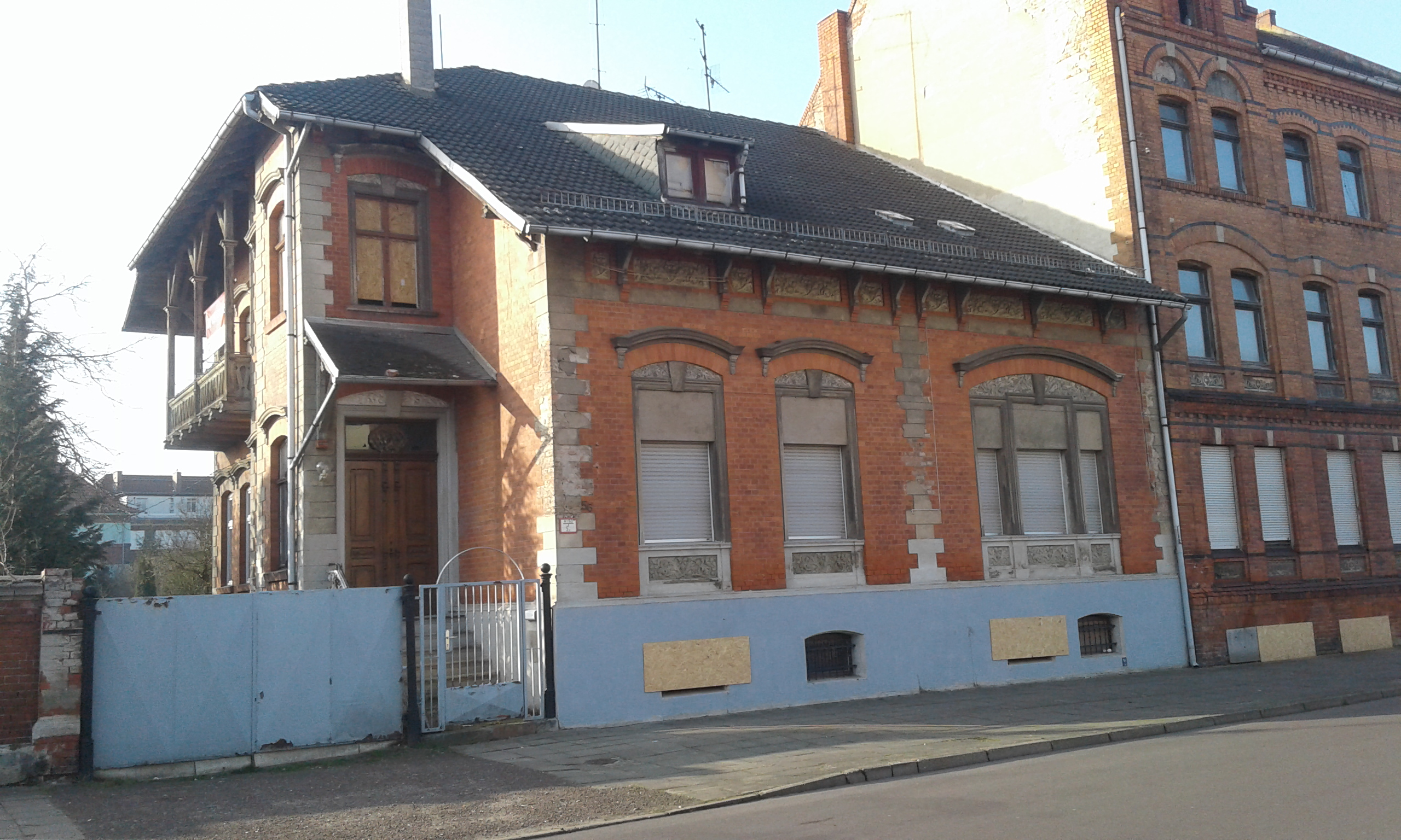 Wohnhaus